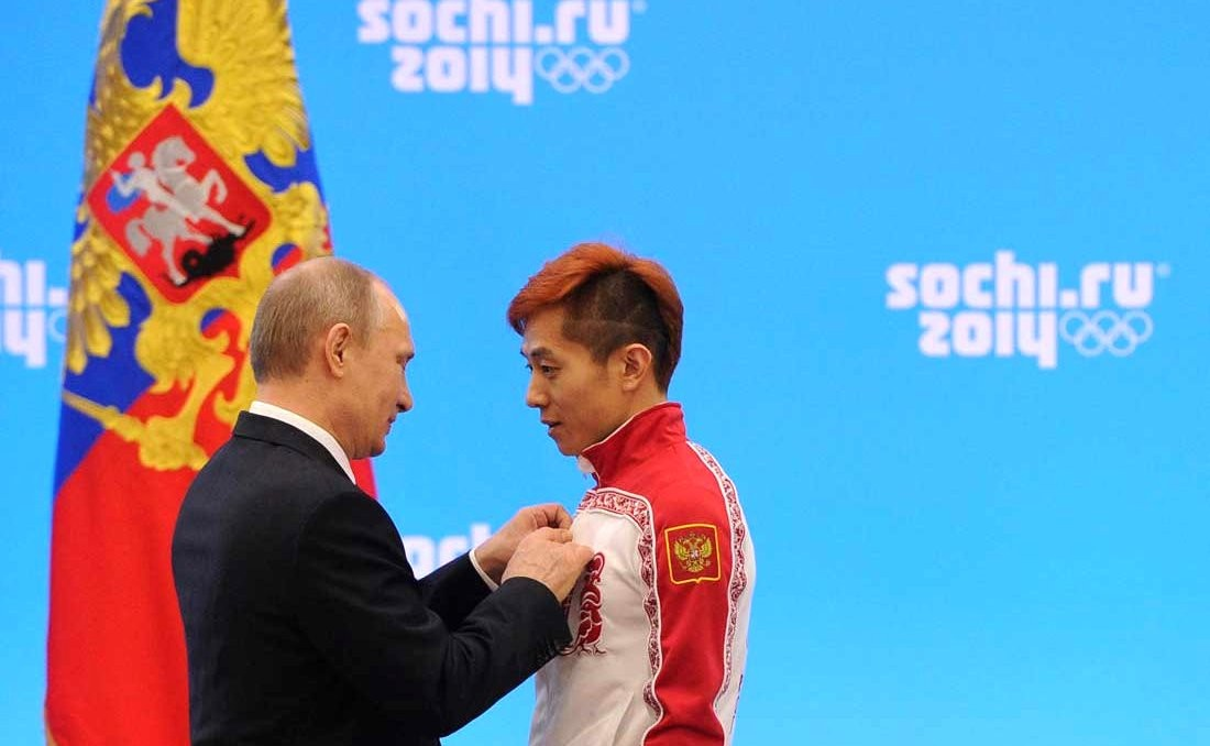 Орденом «За заслуги перед Отечеством» четвёртой степени награждён трёхкратный олимпийский чемпион и бронзовый призёр олимпийских игр в шорт-треке Виктор Ан.